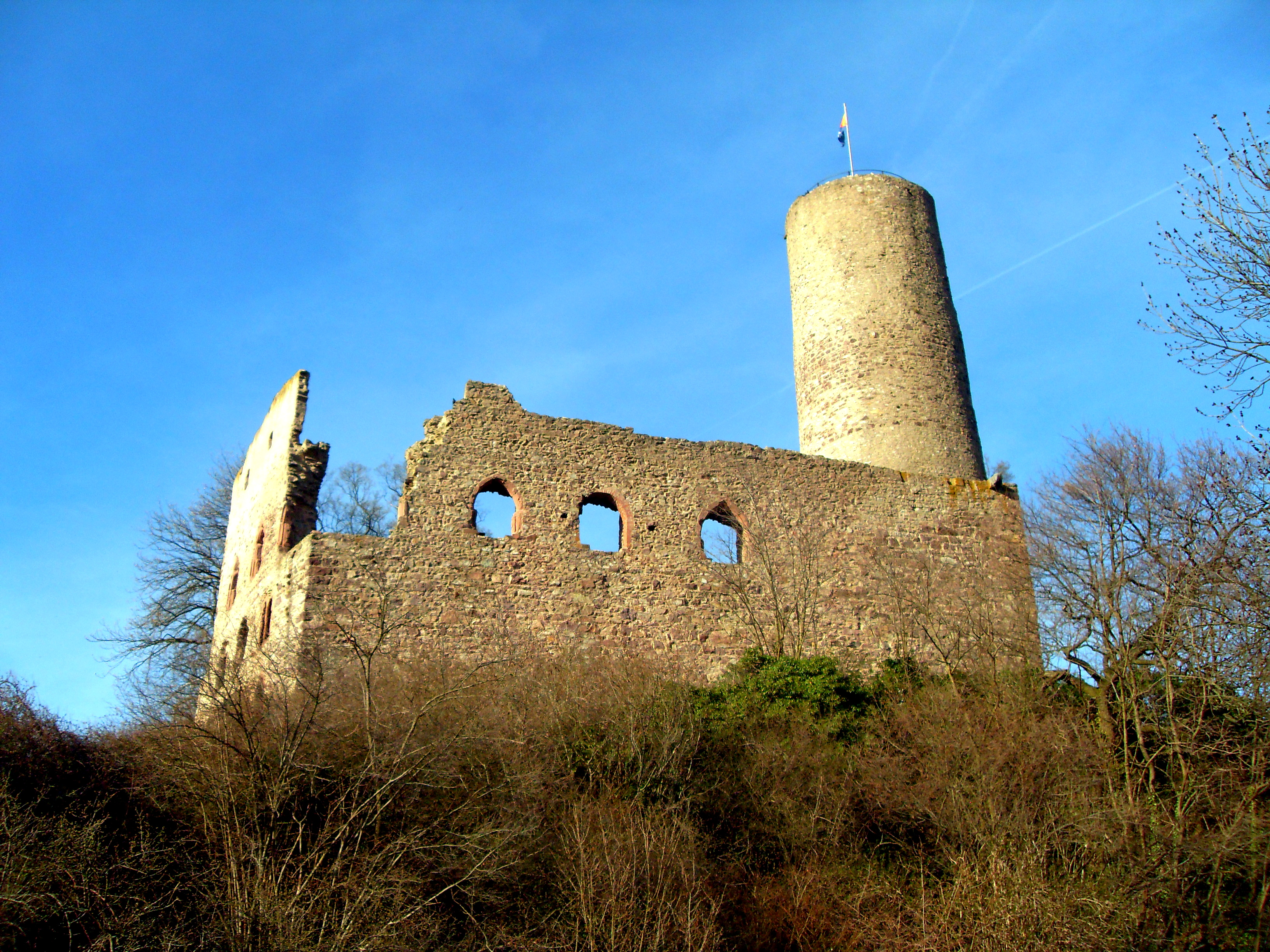 Zamek Strahlenburg w Schriesheim